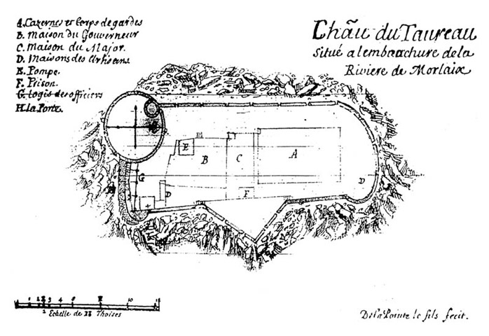 Plan du chateau du taureau avant les travaux décidés par Vauban